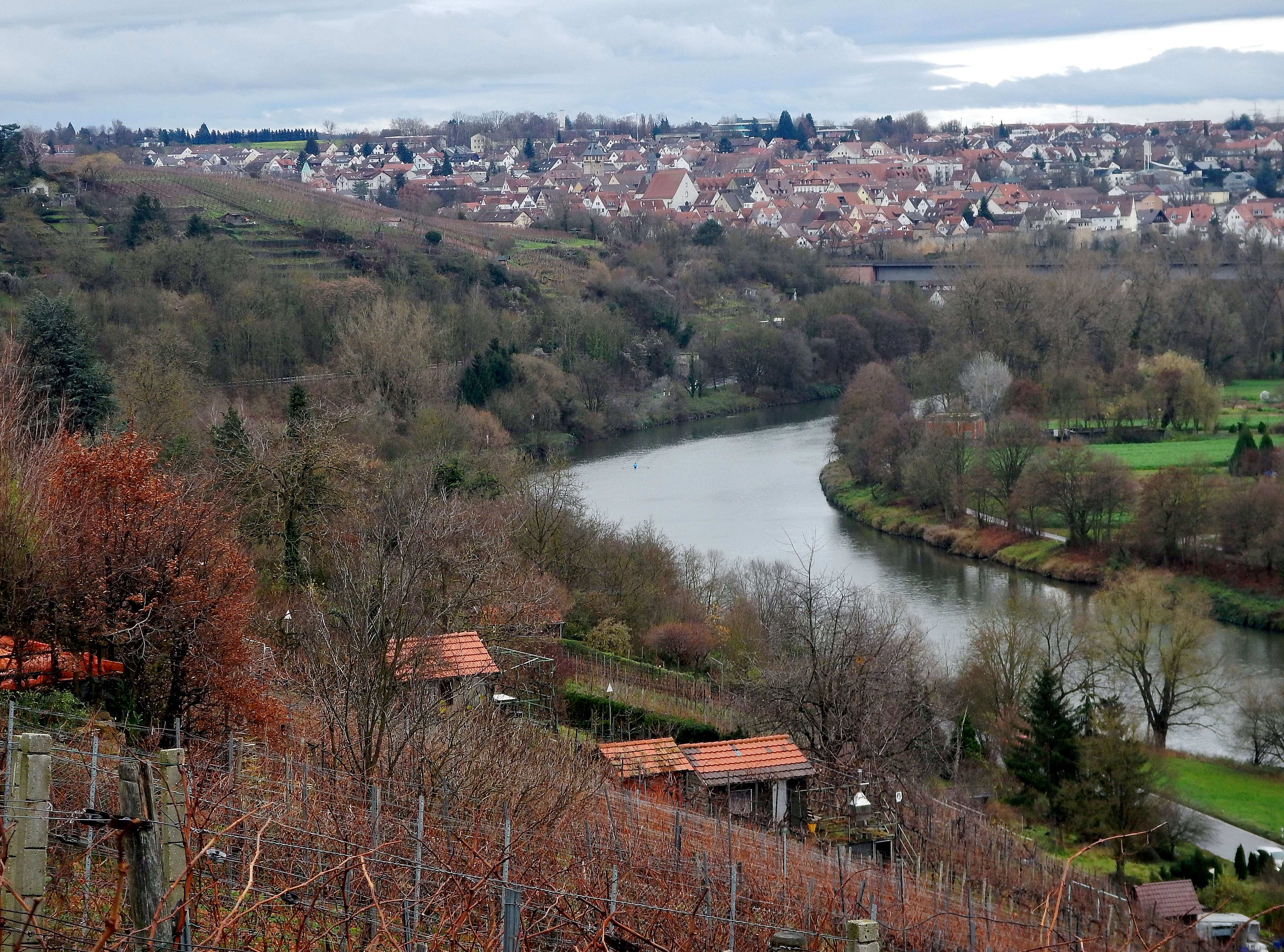 Ausblick in das Neckartal